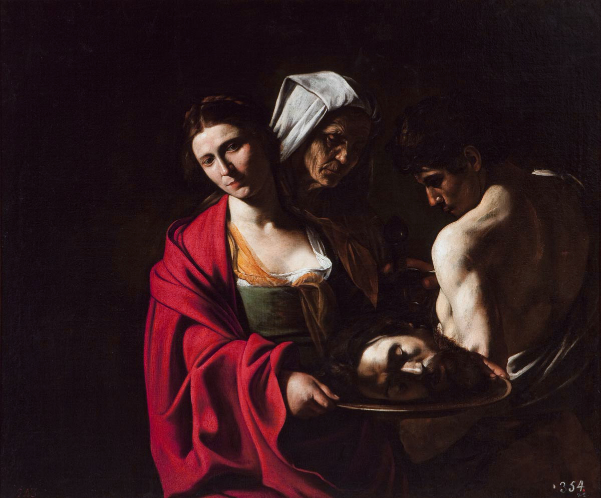 El lienzo muestra a Salomé, hija de la reina Herodias, sujetando con sus manos la bandeja con la cabeza del profeta Juan el Bautista, que según los Santos Evangelios murió decapitado por orden del rey Herodes Antipas tras haber prometido este ultimo a su hijastra Salomé que, si accedía a bailar ante él, le entregaría lo que deseara. Y al pedirle la joven que le entregara la cabeza del Bautista, el rey se mostró contrariado porque lo apreciaba, pero al final accedió a sus deseos y ordenó ejecutarlo, encargándose posteriormente sus discípulos de dar sepultura a su cadáver.